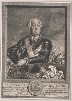 Macquire von Inniskillen, Johann Sigismund (kaiserlicher Feldherr; Feldzeugmeister, 1710-1768), Verteidiger von Dresden 1760